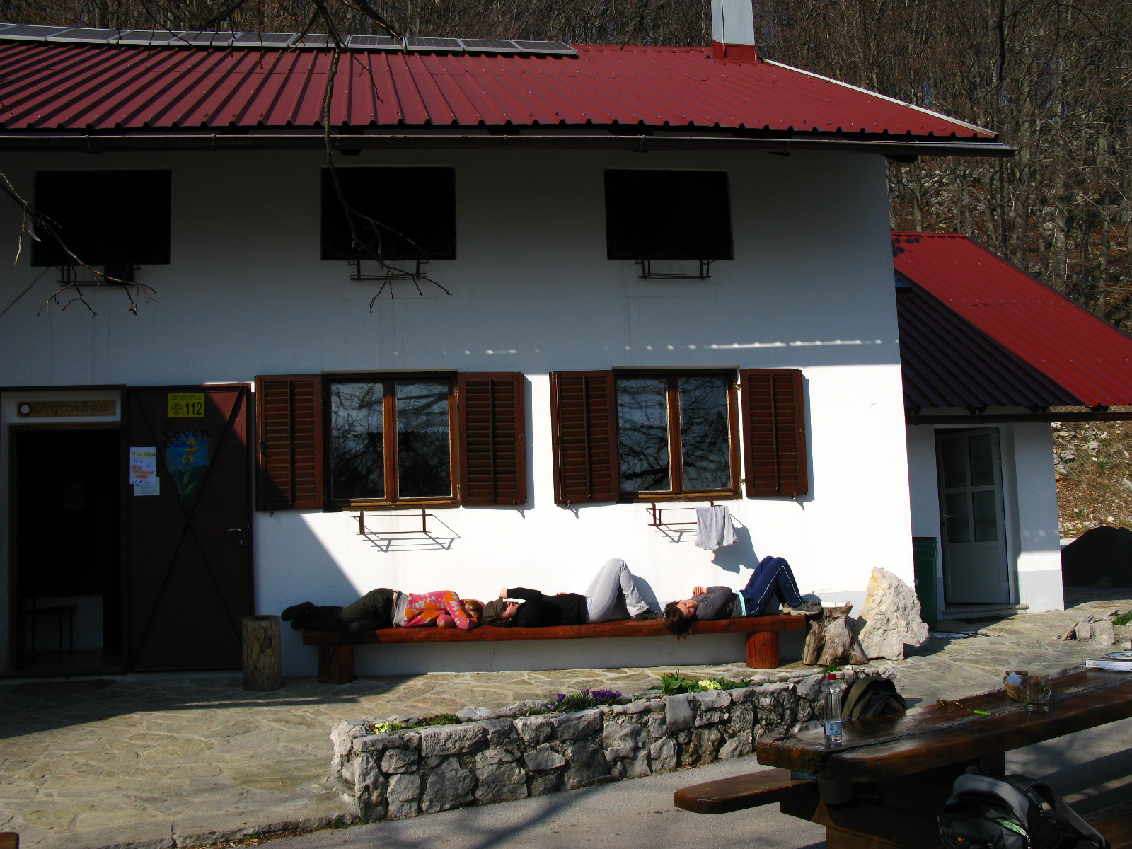 Čaven, pri Ajdovščini, v soboto, 04. 09